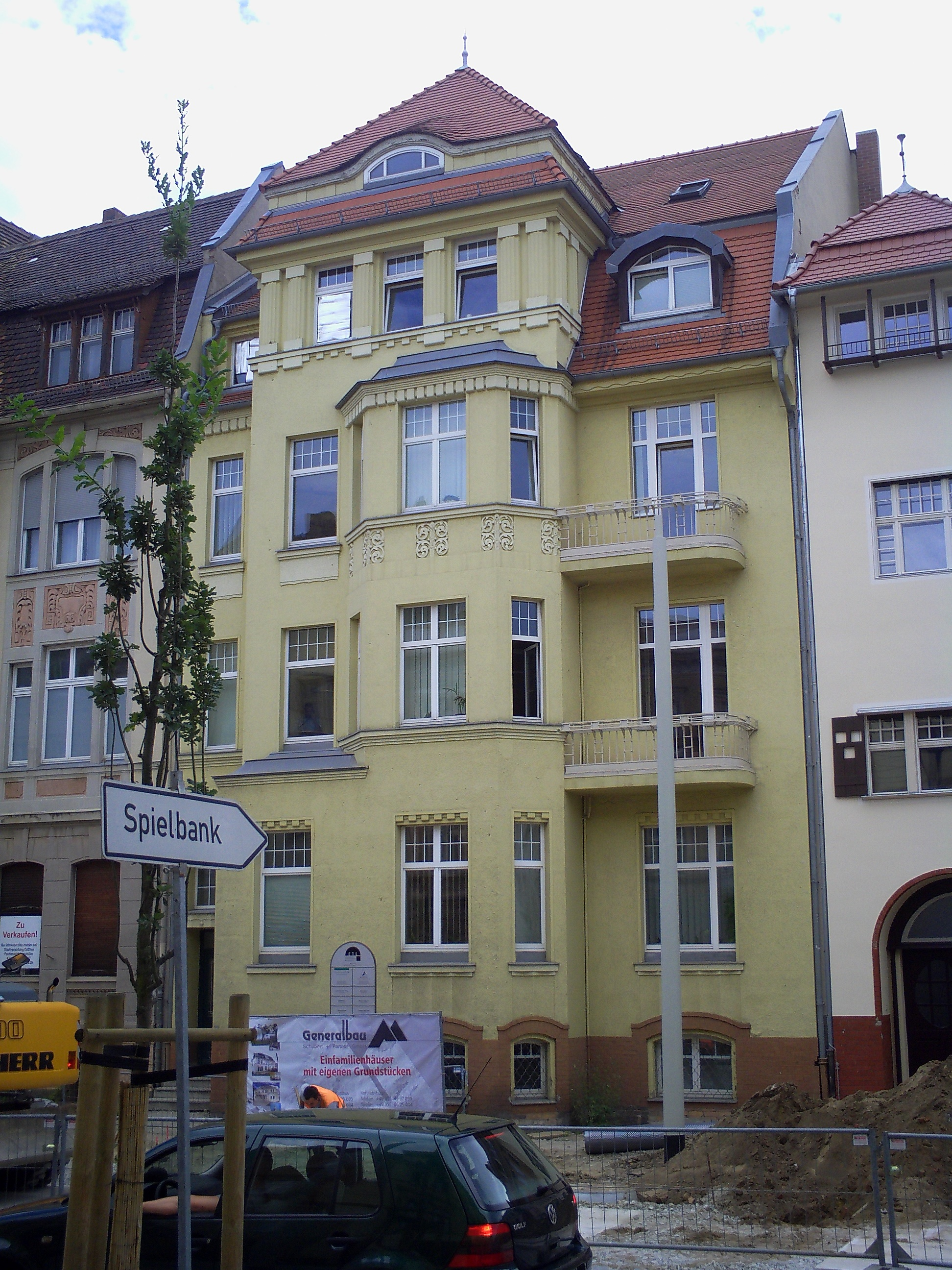 Bahnhofstraße 18 in Cottbus